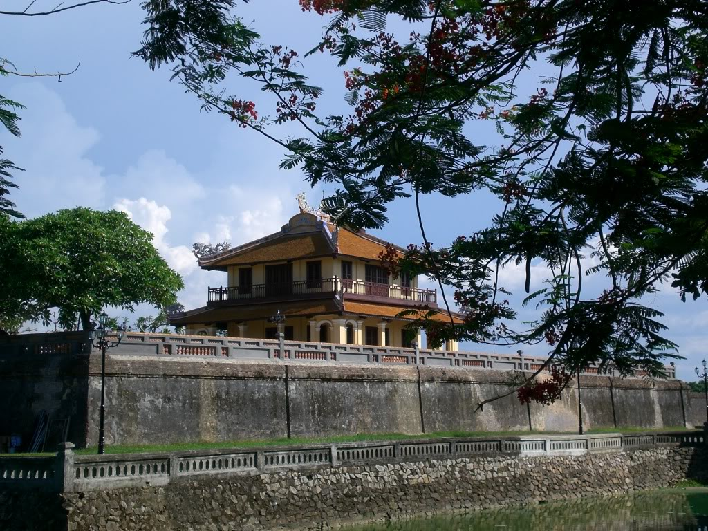 Lầu Tứ Phương Vô Sự sau khi được trùng tu